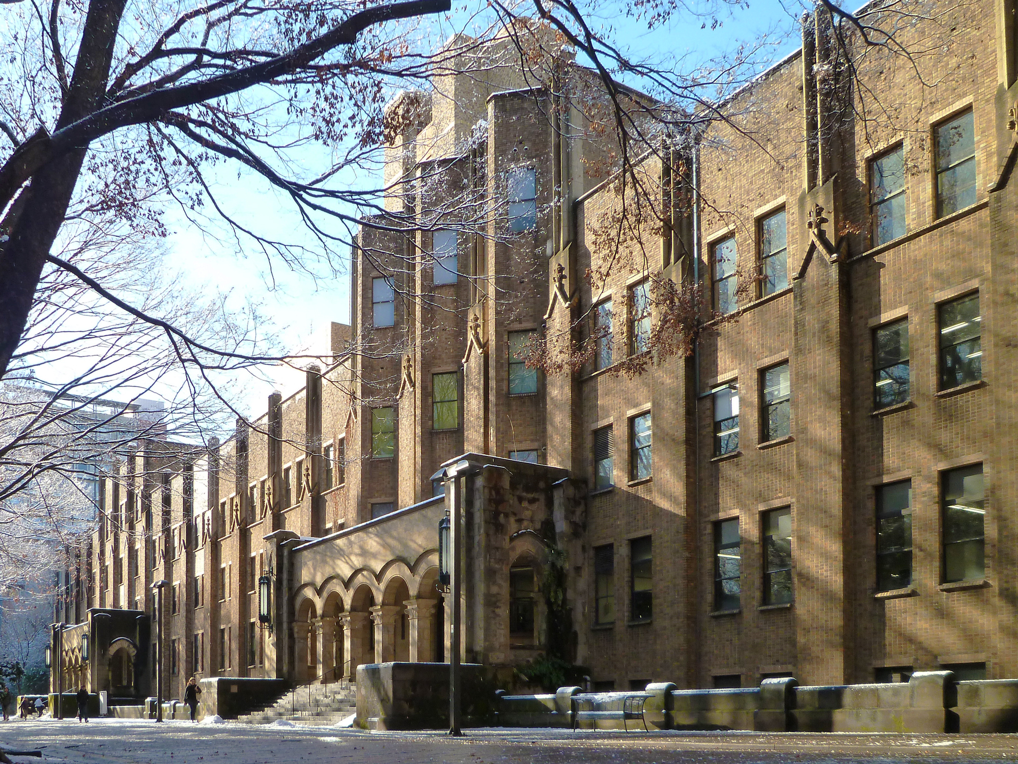 題名に準ずる。